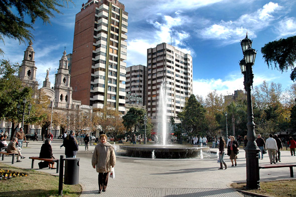 Plaza Roca, en el centro de Rio Cuarto.